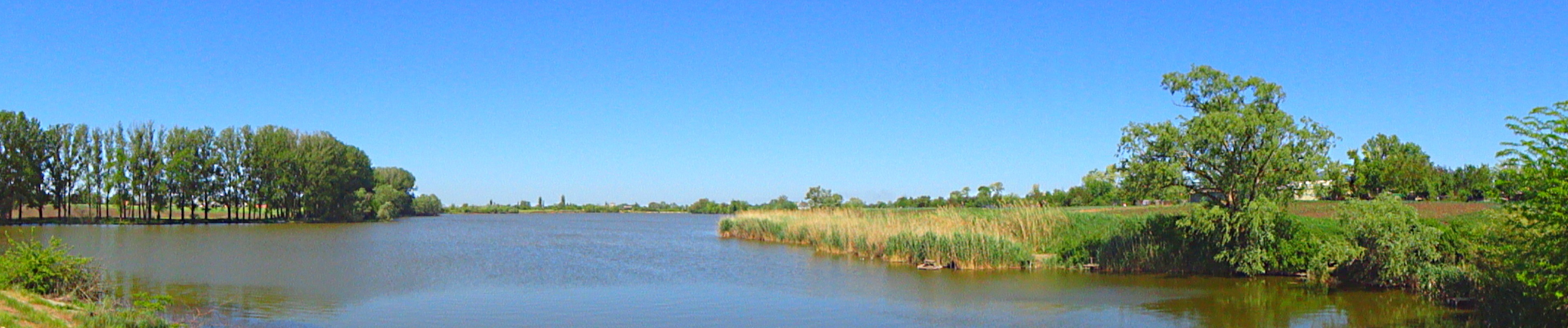 Пруд Нижний в хуторе Чернышев